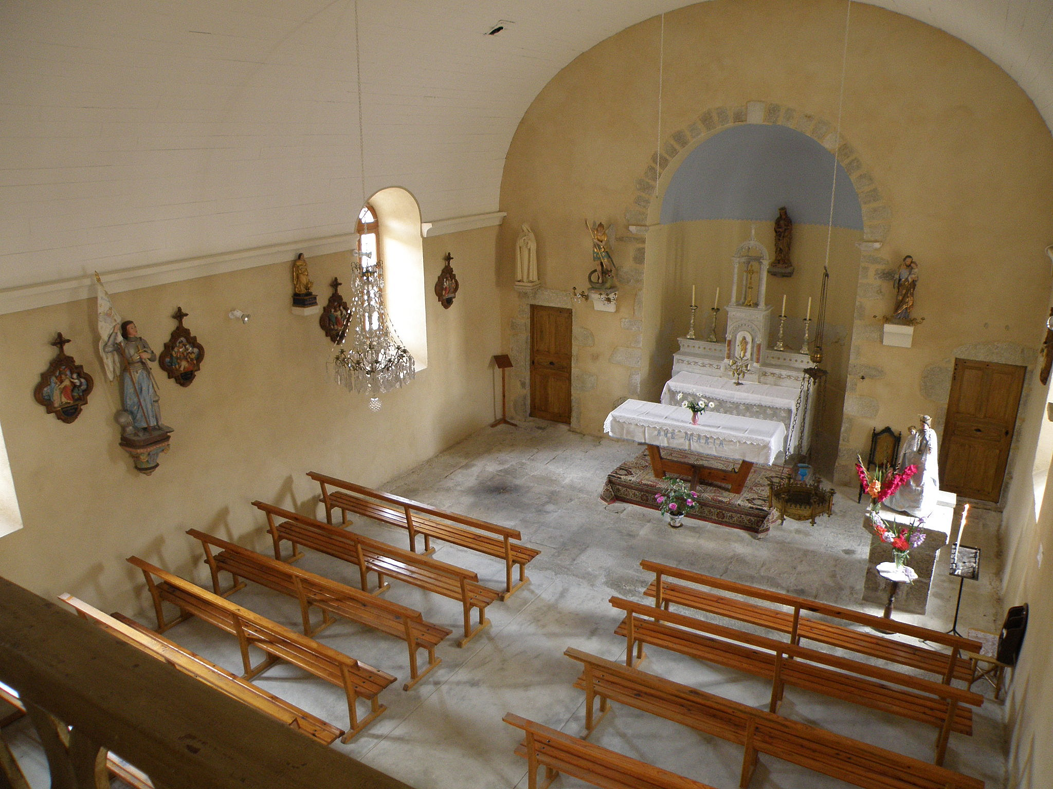 Roche-en-Régnier, comm. de la Haute-Loire, France (Auvergne). Chapelle Notre-Dame-de-Bon-Secours, vue intérieure depuis la tribune. Remarquer la statue en bois doré de saint Jean l'Évangéliste, juste sous le lambris de la voûte à gauche, la statue de Notre-Dame-de-Bon-Secours dans le choeur, et le grand lustre en verre soufflé au centre gauche.